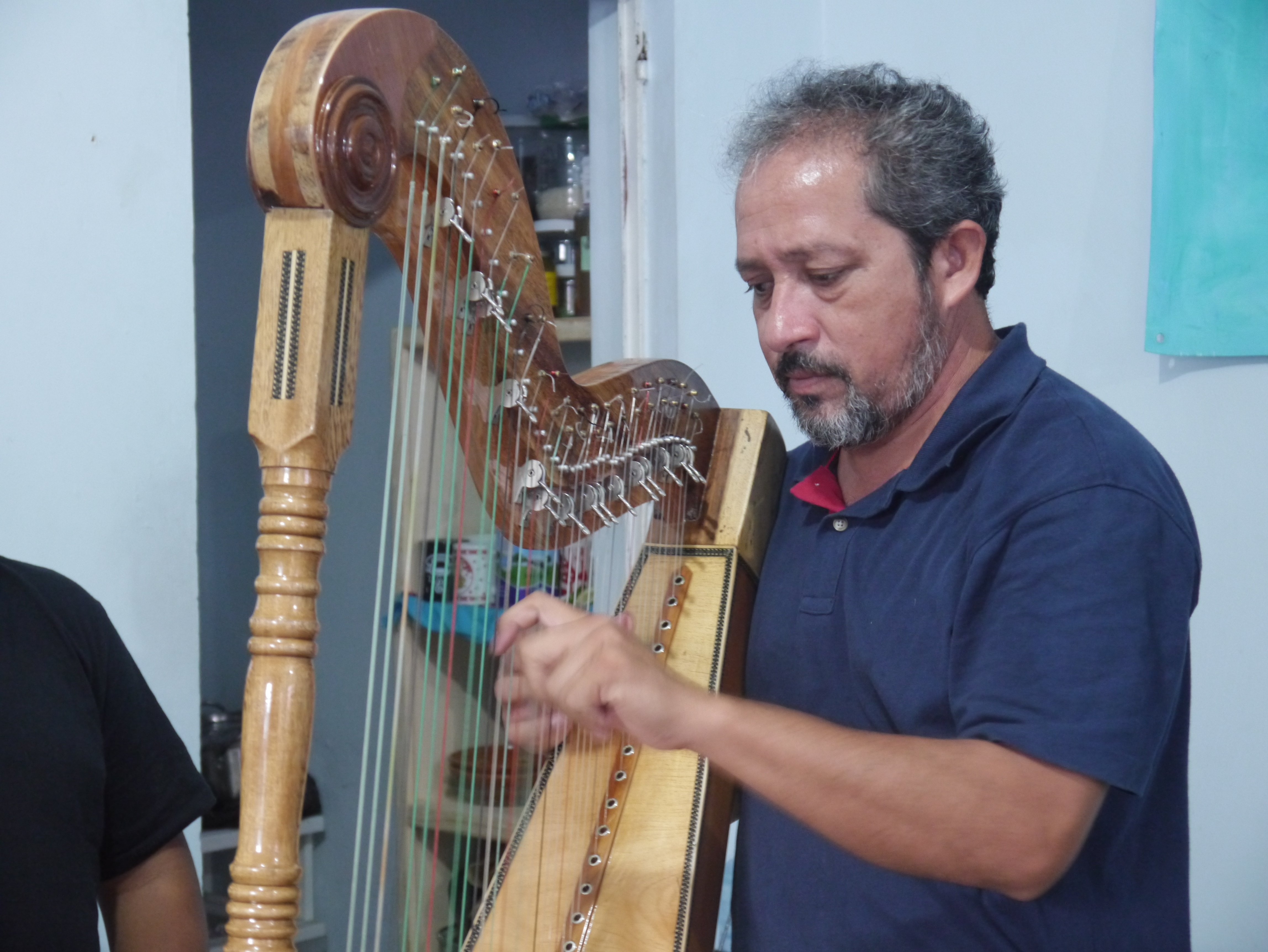 Octavio Vega, arpista integrante del grupo mono blanco.